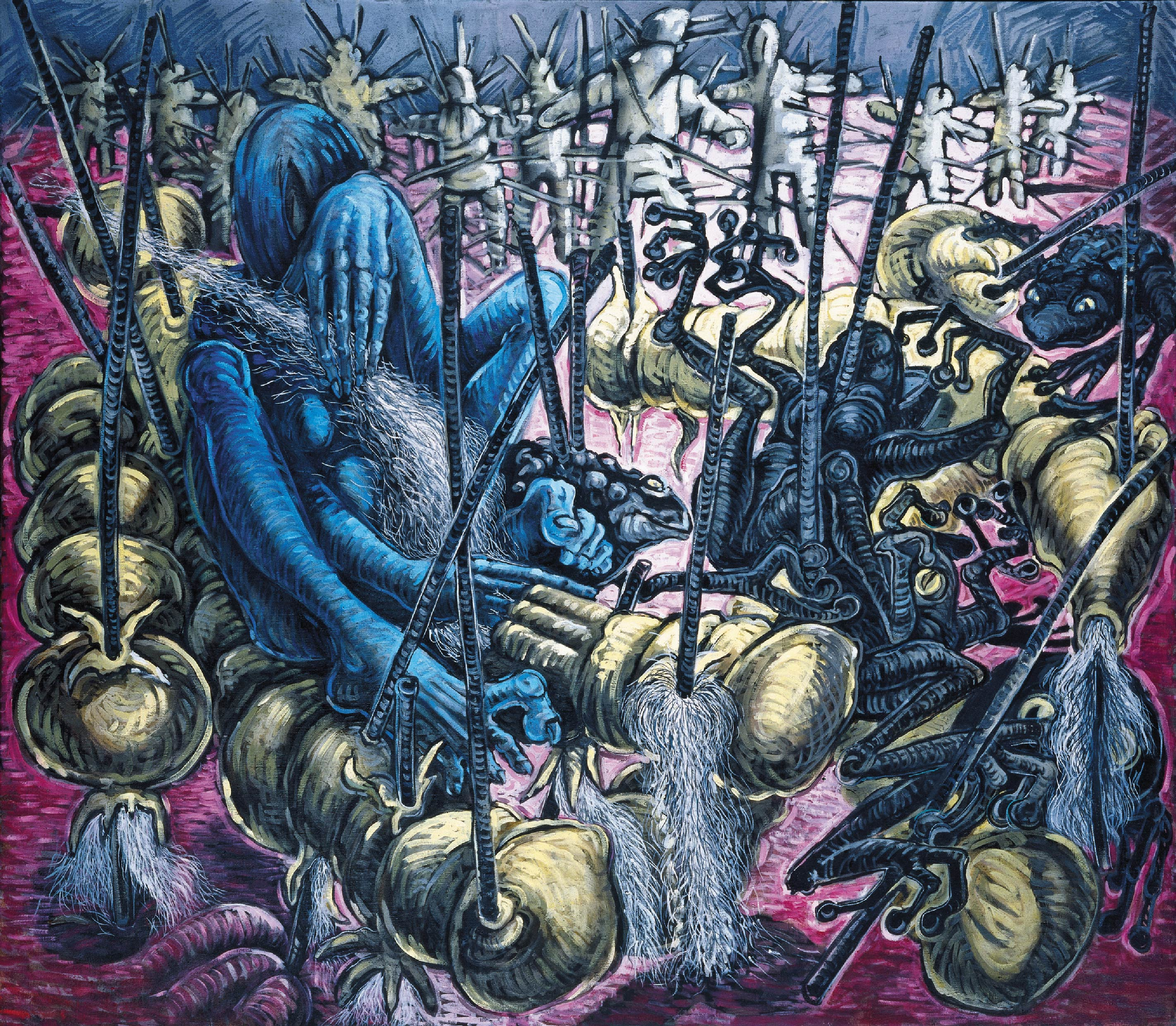 Malba od Xénie Hoffmeisterové. Olej na plátně, 140 x 160 cm, 2000